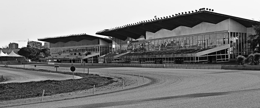 Le tribune